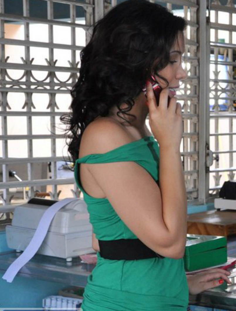 Derivative work